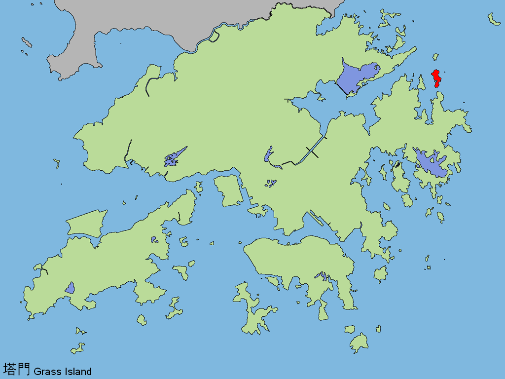 中文（香港）: 塔門。